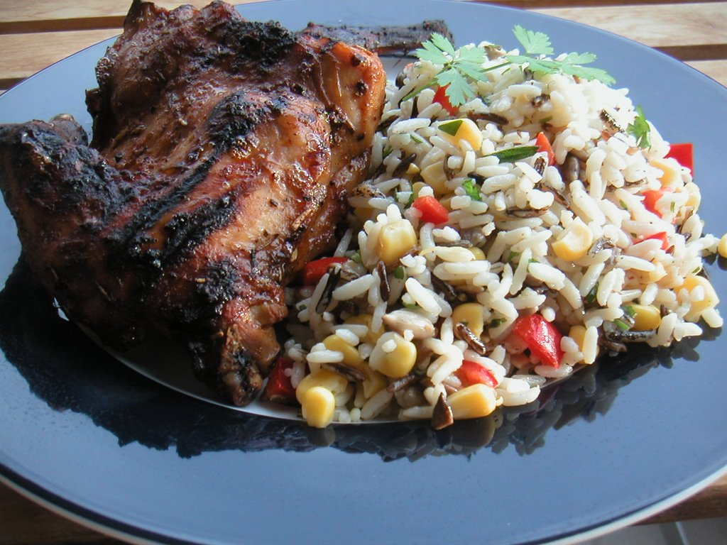 Grillet kanin med rissalat